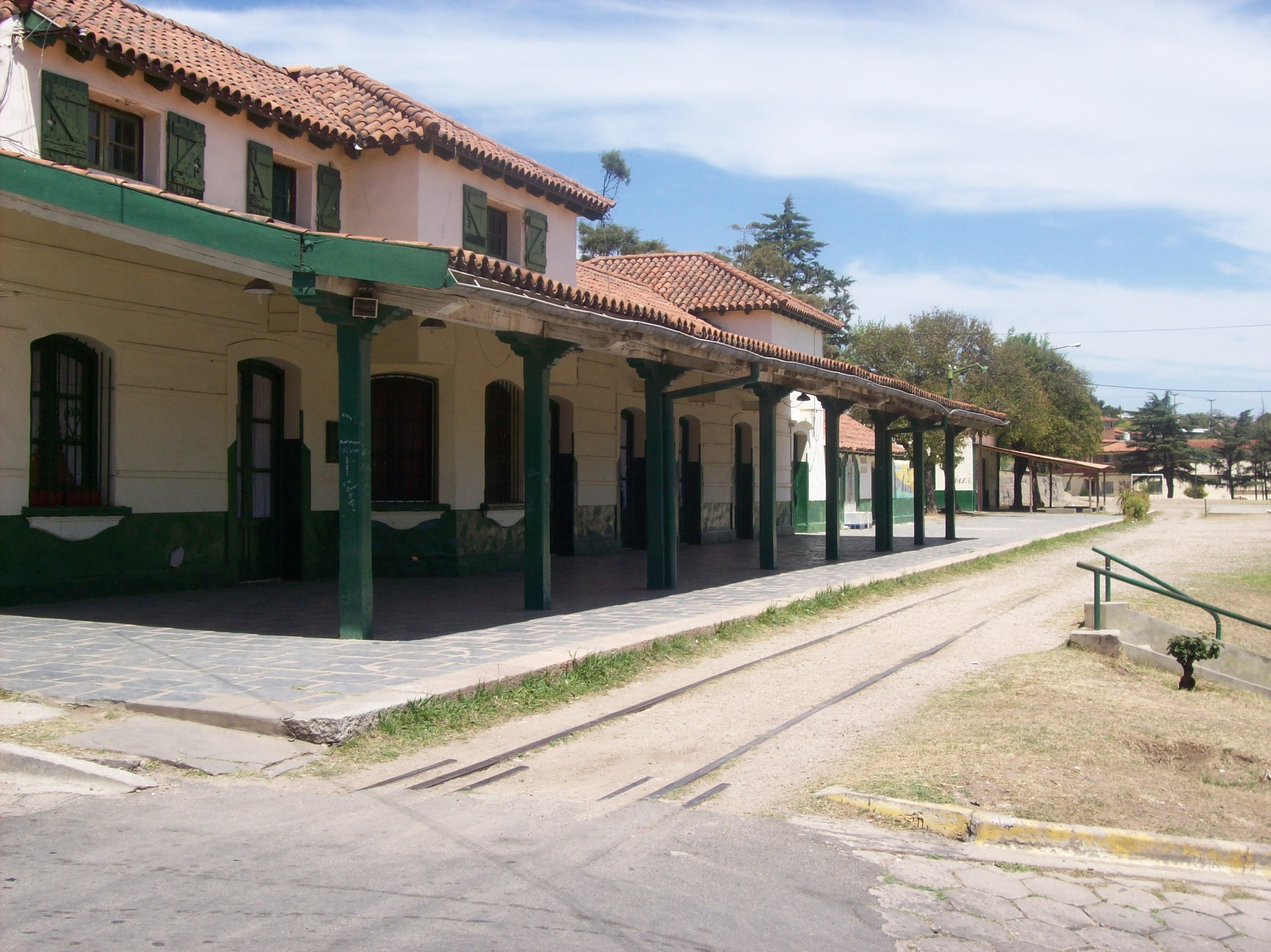 Andén de la estación La Falda del Tren de las Sierras, sin servicio ferroviario, en la provincia de Córdoba, Argentina.